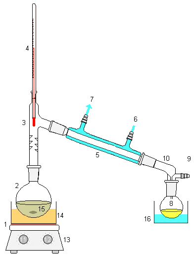 Simple distillation